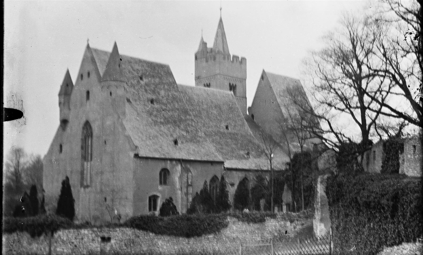 Original Zitiertext: Ansicht der Burgkirche; o. D. (Historische Aufnahme der Burgkirche, Mitte des 20. Jahrhunderts)